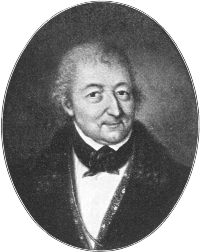 Selbstporträt Gottfried August Thilo (1766–1855) Miniaturist, Kupferstecher